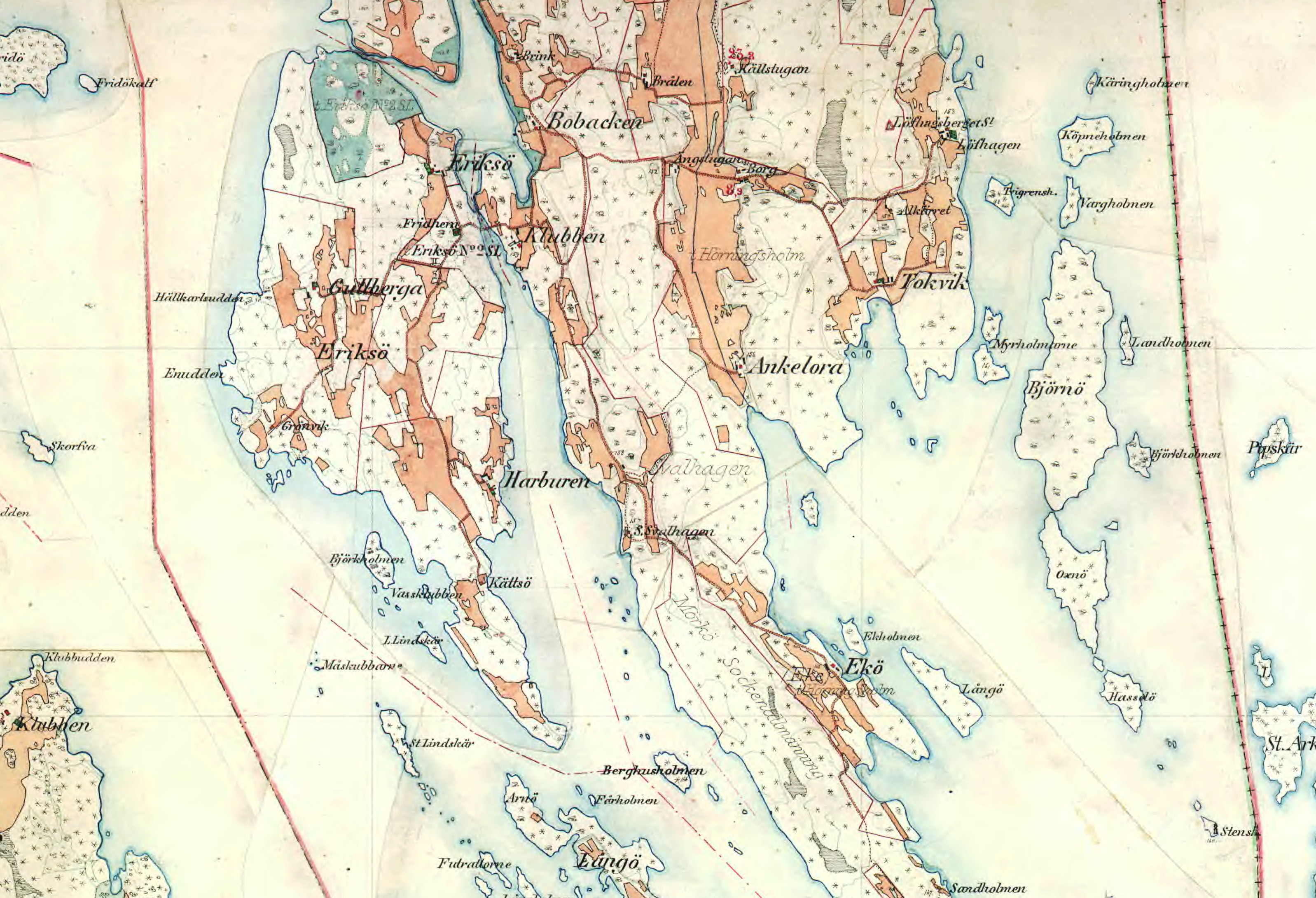 Del av Häradsekonomiska kartan visande över Eriksö och södra delen av Mörkö